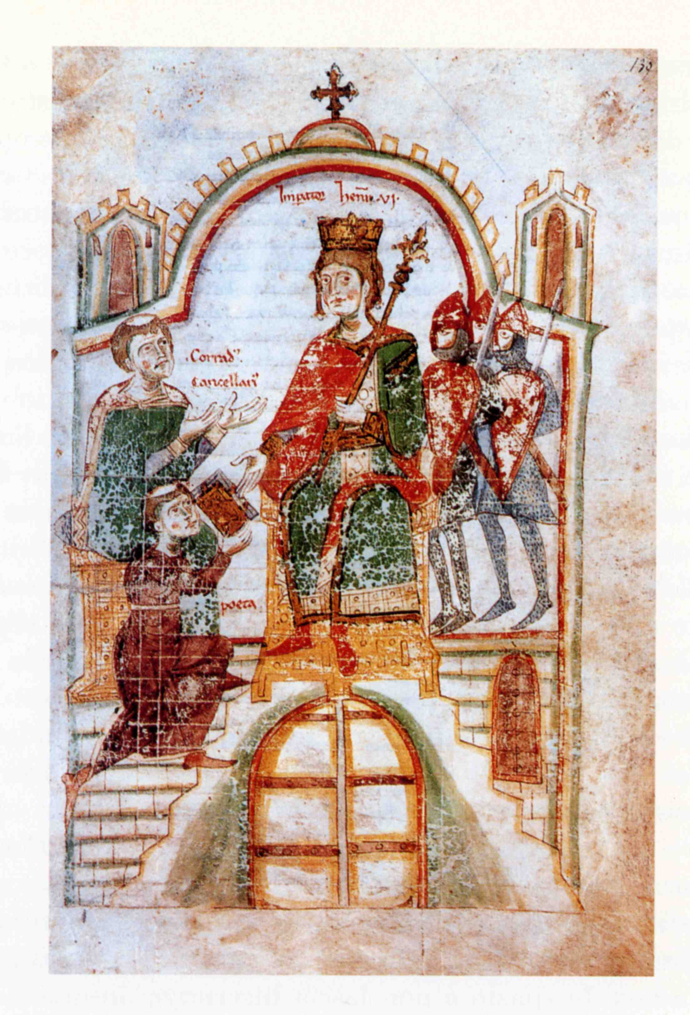 Pietro da Eboli, "Liber ad honorem Augusti" (scritto e miniato a Palermo tra il 1195 e 1197). La miniatura mostra Pietro da Eboli tonsurato e vestito da frate che, recatosi nel castello, in qualità di poeta offre la sua opera scritta all'imperatore Enrico VI di Svevia seduto in trono; accanto a Pietro sta Corrado di Querfurt, cancelliere dell'Imperatore.